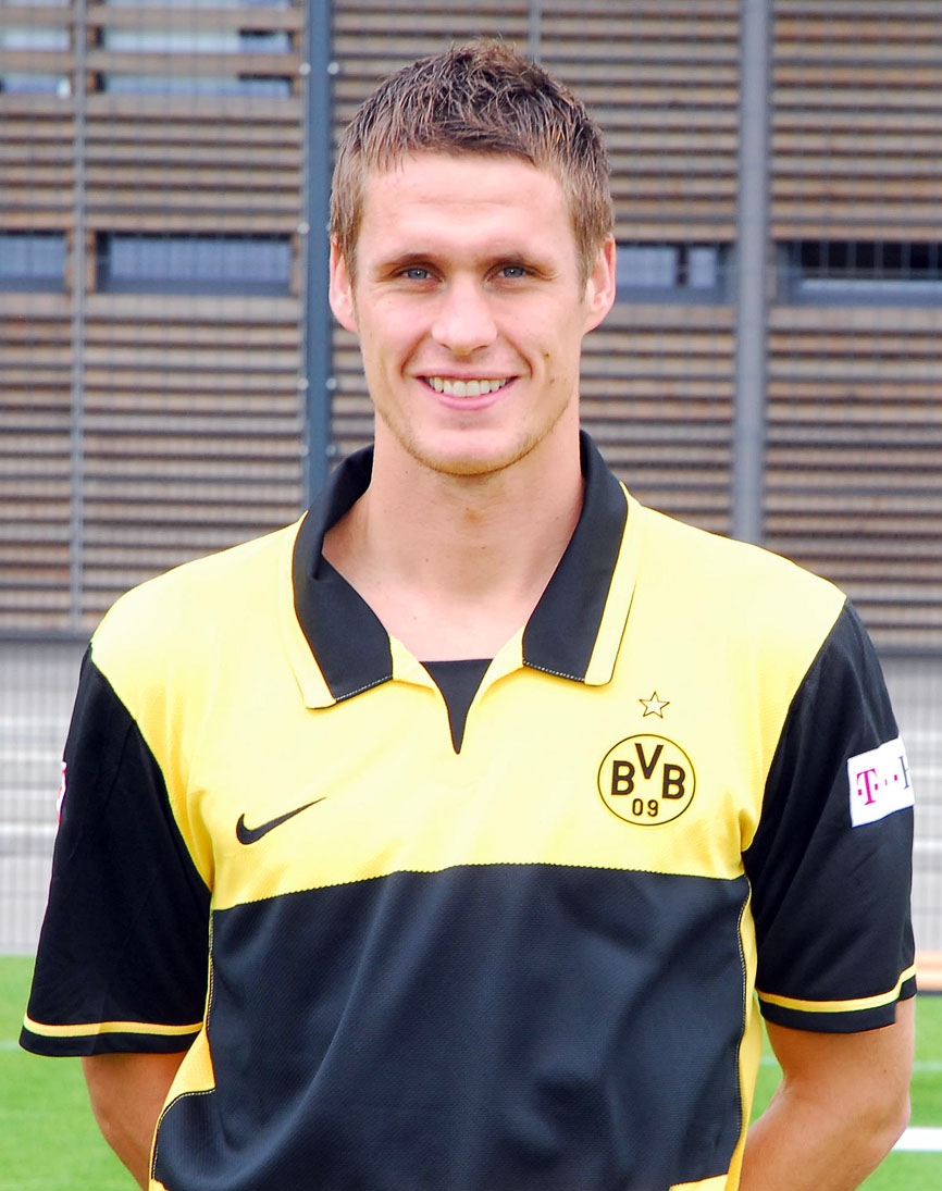 Sebastian Kehl bei der Mannschaftspräsentation 2007